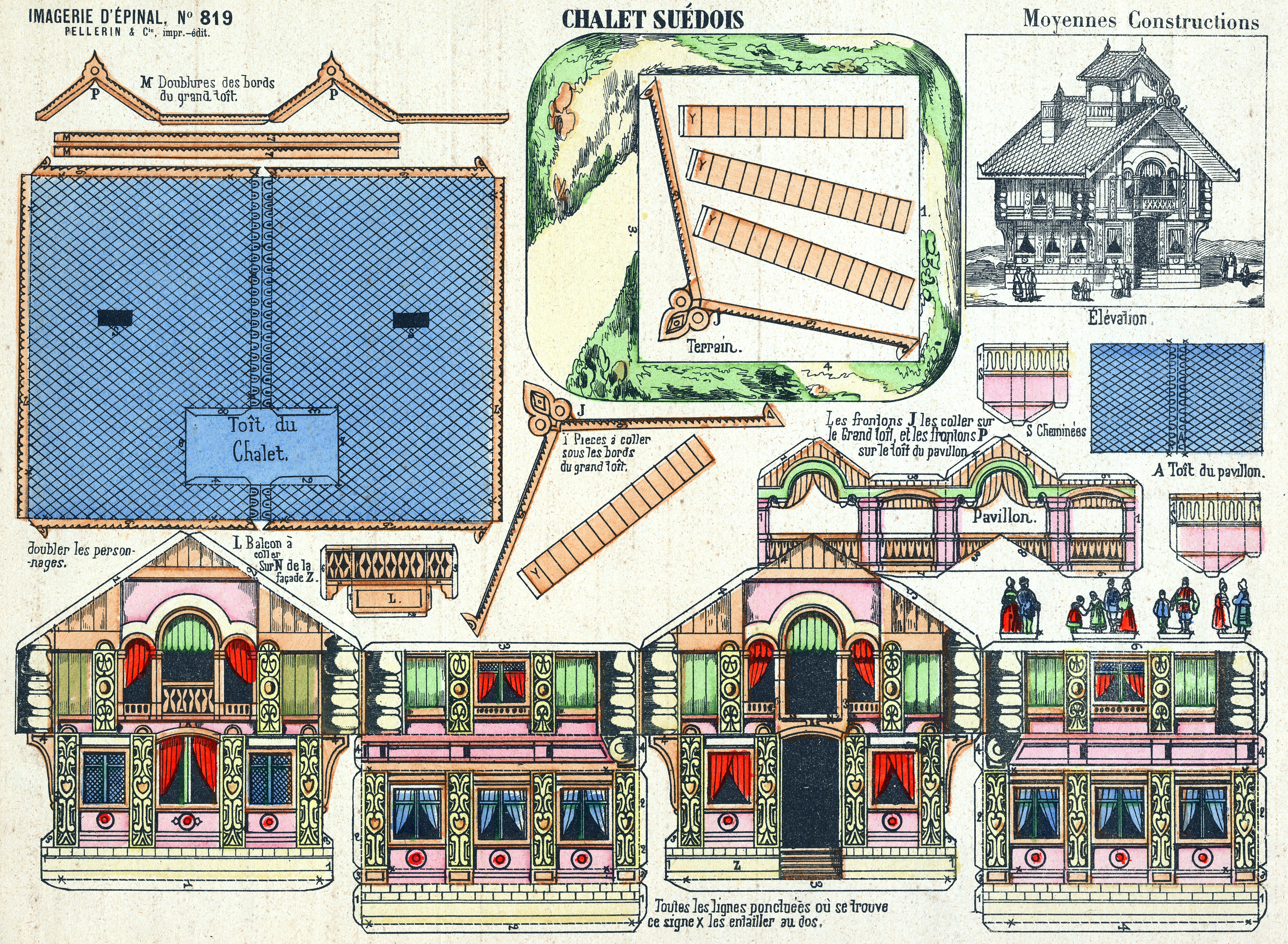 Färglagt litografiskt tryck från 1870-talet och den franska firman Pellerin i Epinal. Från detta tryck kunde man bygga en modell av en på sin tid välkänd svensk exportprodukt - nämligen ett monteringsfärdigt trähus från någon av landets stora snickerifabriker. Husets yttre form är ganska igenkännlig, men klipparkets färger är ren fantasi.